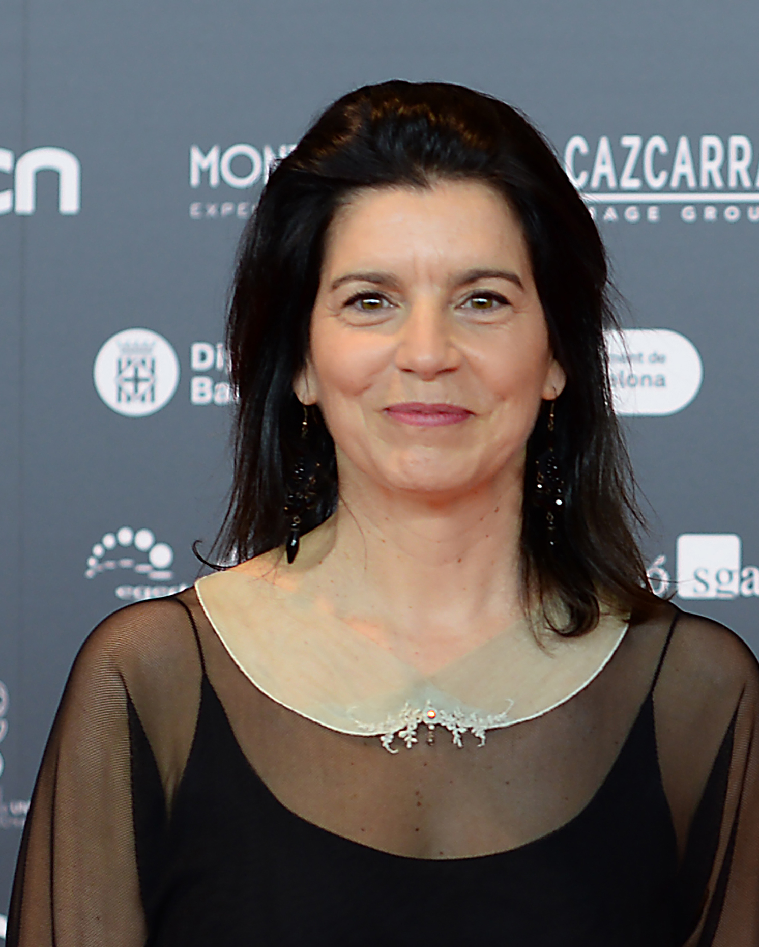 Laia Marull, actriu, XII Premis Gaudí (2020)